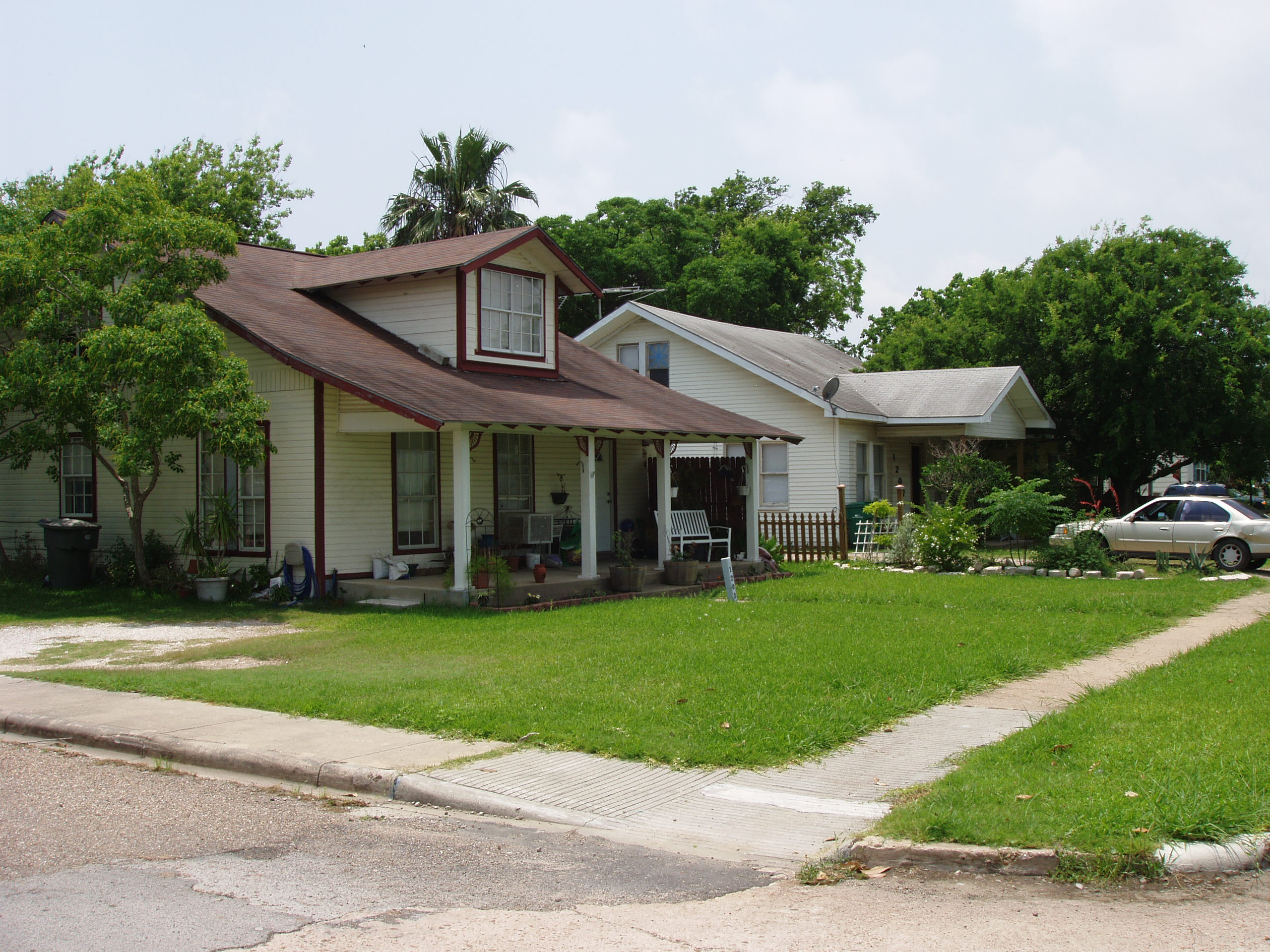 Wohnhäuser in Freeport, Texas